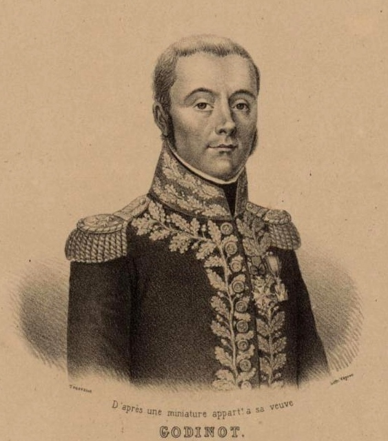 Nicolas Godinot (1765-1811), général de division et baron de l'Empire. Tenu en échec par les Anglo-Espagnols devant Gibraltar et Tarifa, il se suicide après une entrevue orageuse avec le maréchal Soult.